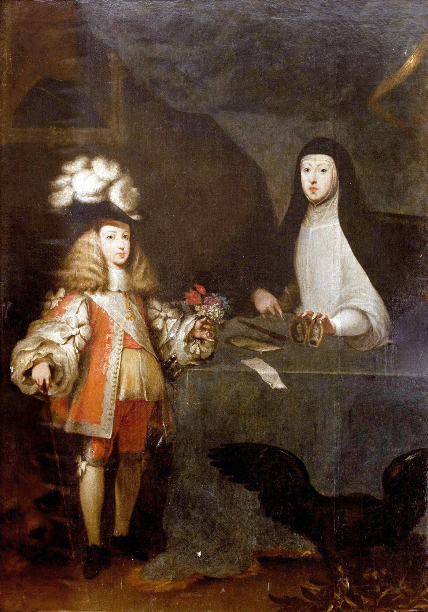 Carlos II niño con su madre, la reina regente Mariana de Austria